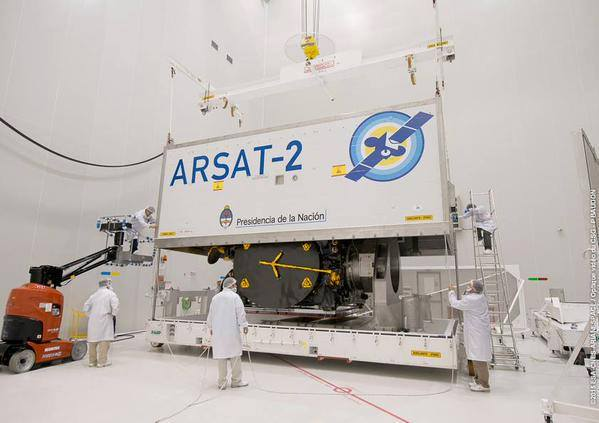 El satellite argentino ARSAT-2 siendo guardado para su viaje hasta el Puerto espacial de Kourou